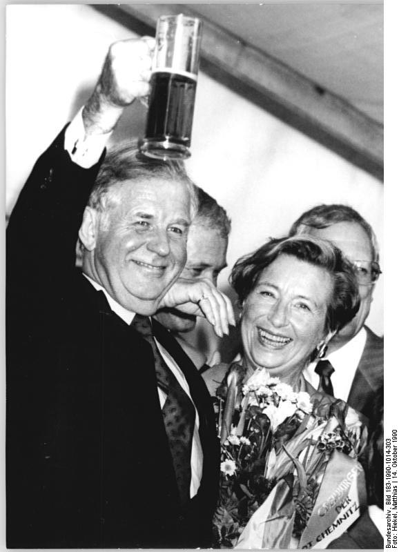 Dresden, Landtagswahl, Kurt Hans Biedenkopf ADN-ZB Matthias Hiekel 14.10.90 wü Sachsen: Landtagswahl. Mit der neuen Sachsenhymne "Hier kommt Kurt" und Sprechchören "wir haben einen Biedenkopf" feierten die CDU-Anhänger in Dresden ihren Spitzenkandidaten Prof. Dr. Kurt Biedenkopf.